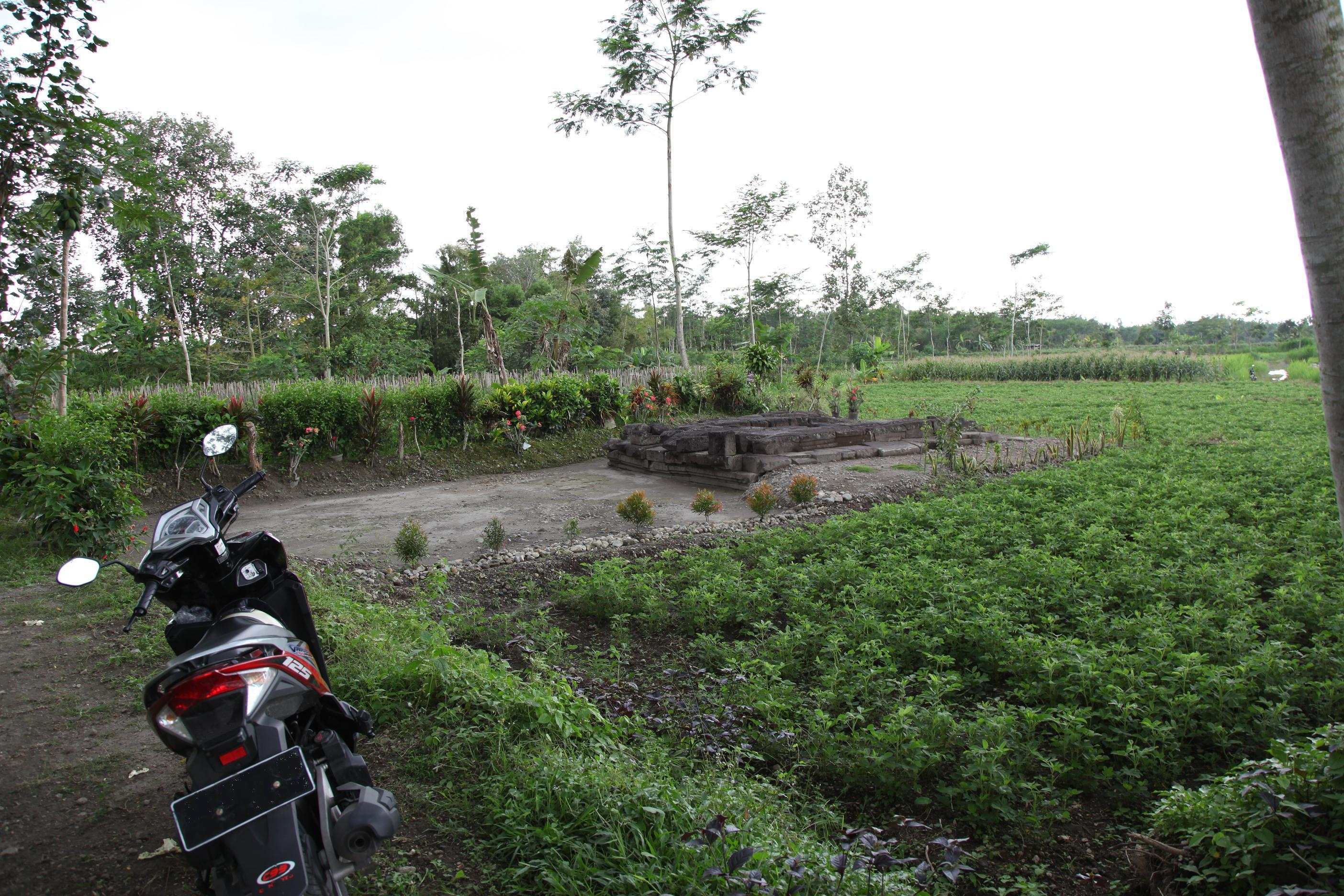 Situs Sumberagung (Sumberagung Temple describe)